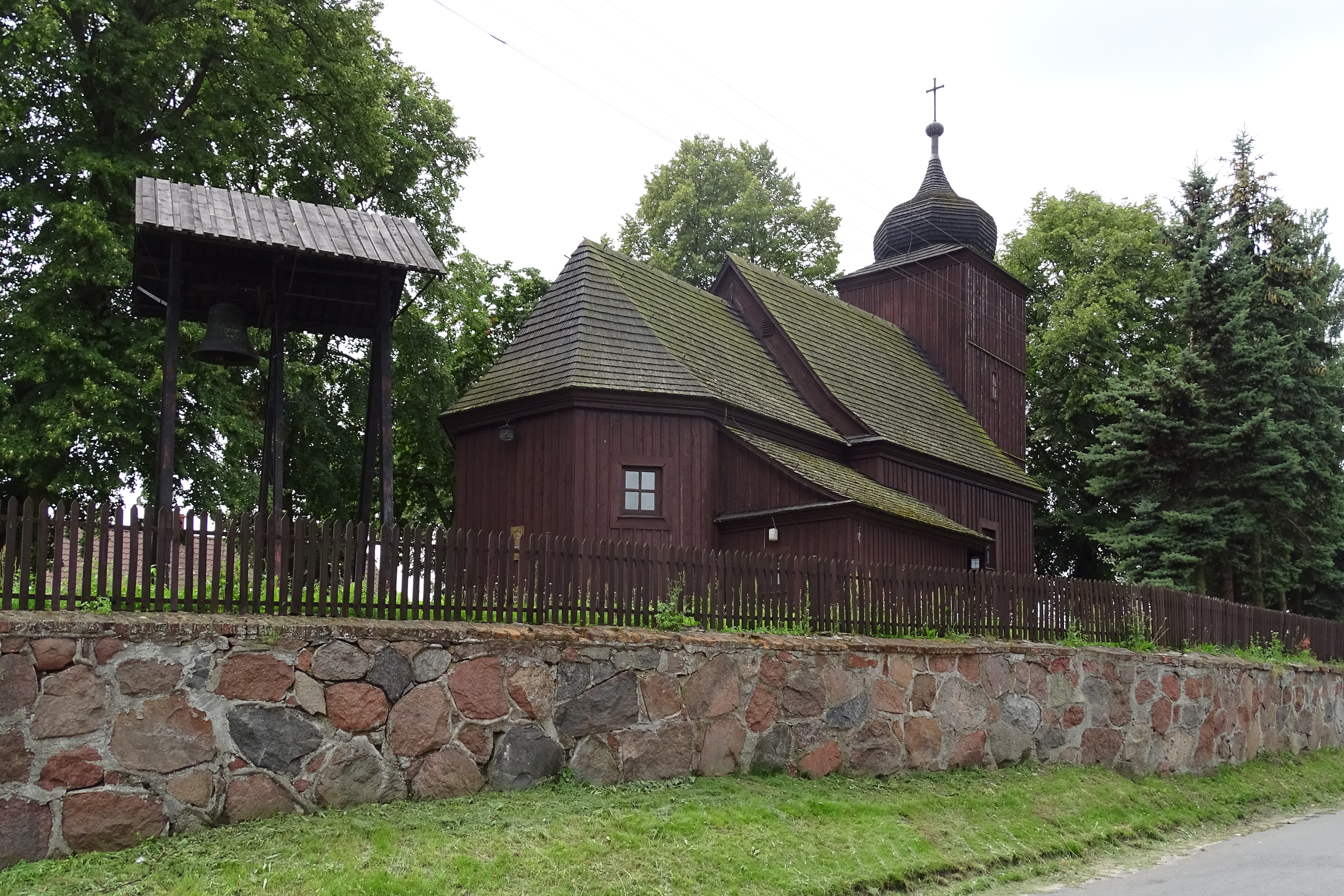 Świątkowo, Gmina Janowiec Wielkopolski, Poland. Church of The Holy Trinity. 18th century.